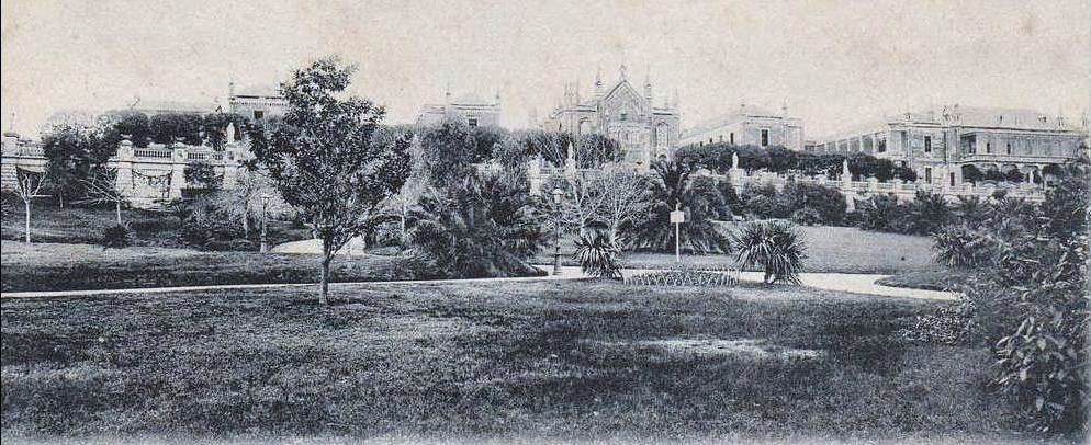 Vista del Paseo de la Recoleta (hoy Plaza Intendente Alvear) y el Asilo de Ancianos, hoy Centro Cultural Recoleta, a comienzos del siglo XX.